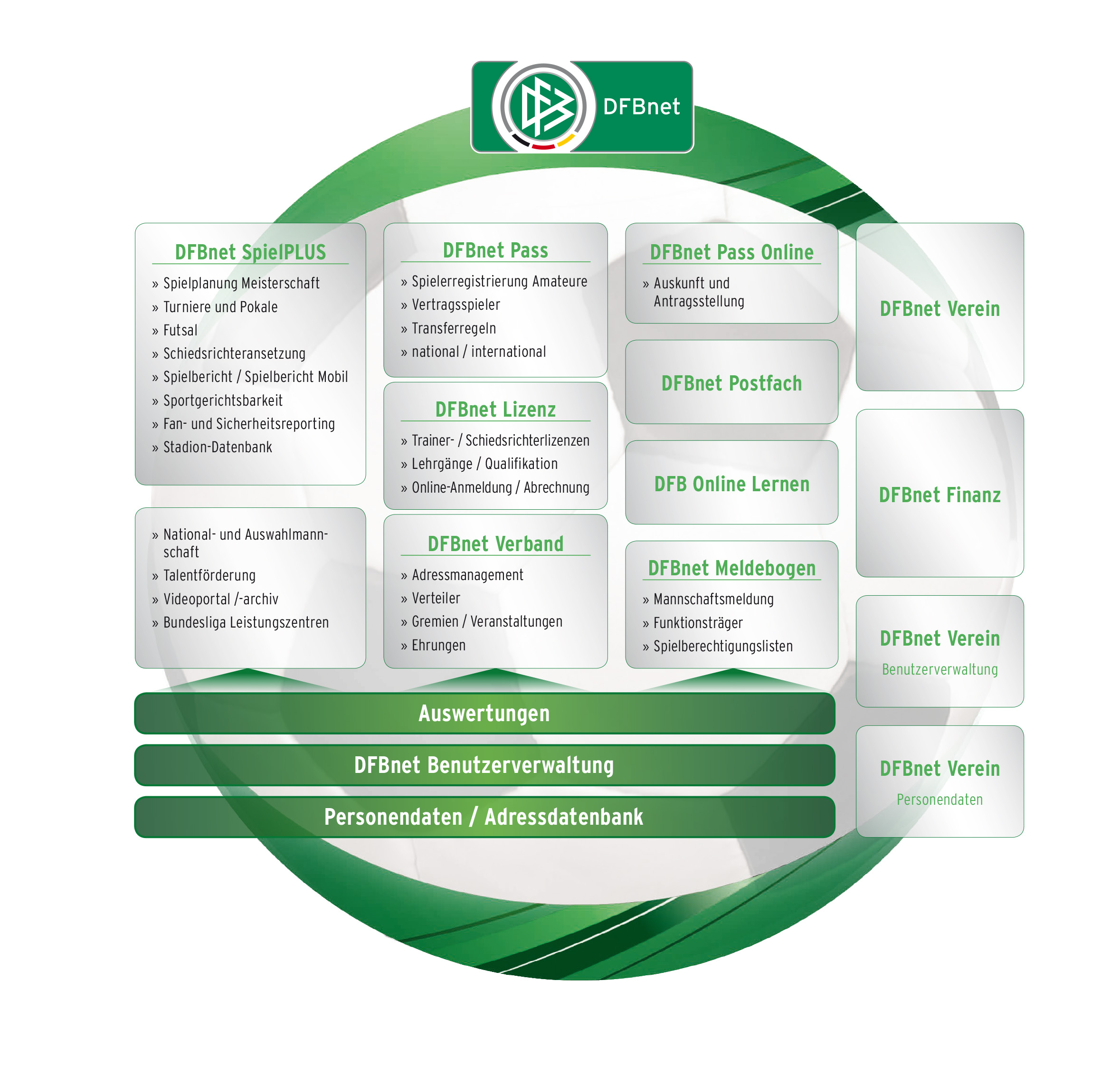 Ein Großteil der genutzten DFBnet-Module in der Übersicht.